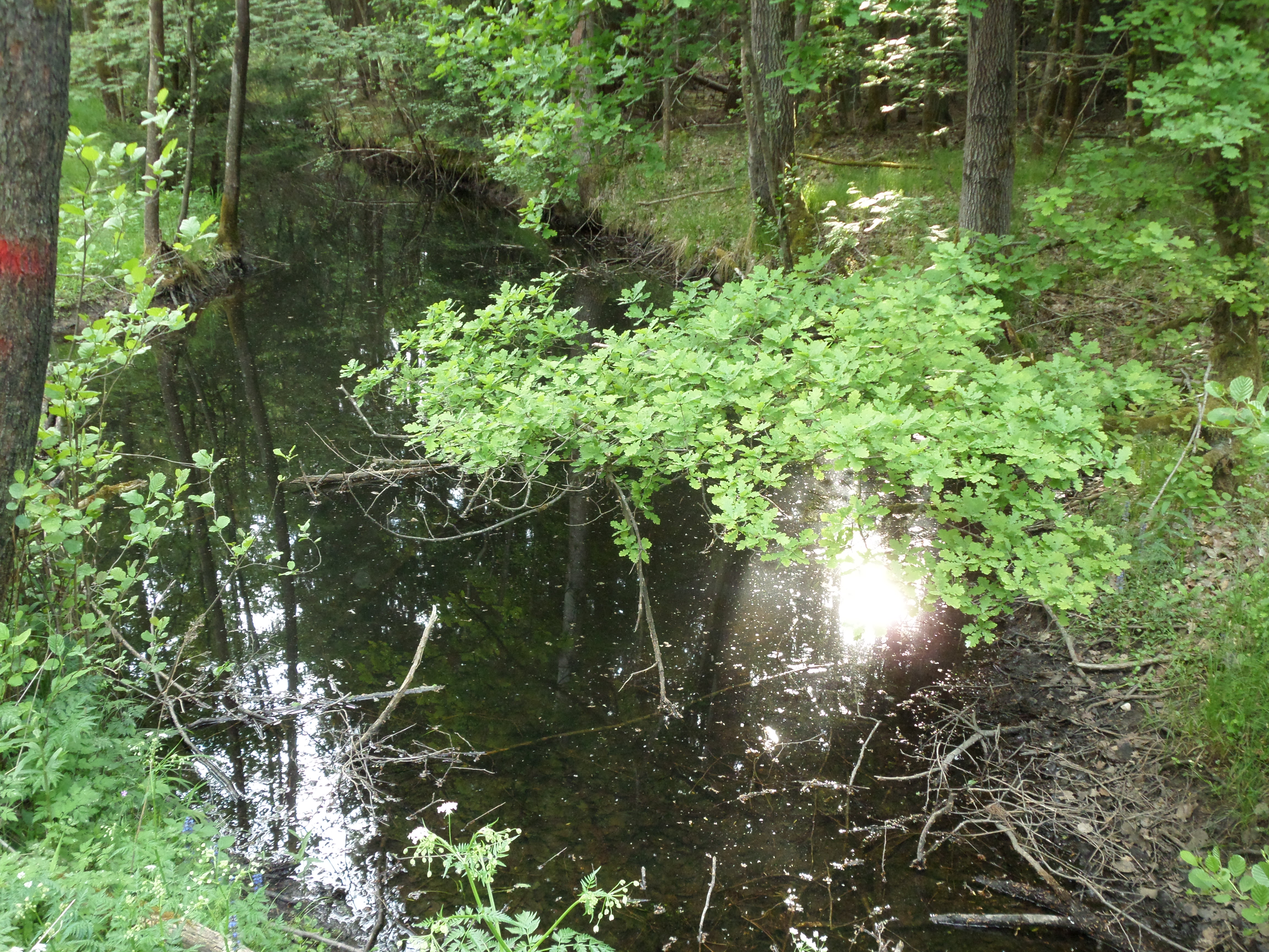 Schneidersbach Laufamholzer Forst Gewässerkennzahl DE: 242292 Quelle westlich der Nürnberger Exklave Brunn im Staatsforst Brunn 49° 26′ 37″ N, 11° 13′ 12″ O Quellhöhe 361 m Mündung in Nürnberg-Erlenstegen im östlichen Teil des Distrikts Wasserwerk in die Pegnitz 49° 28′ 21″ N, 11° 10′ 46″ O Mündungshöhe 306 m